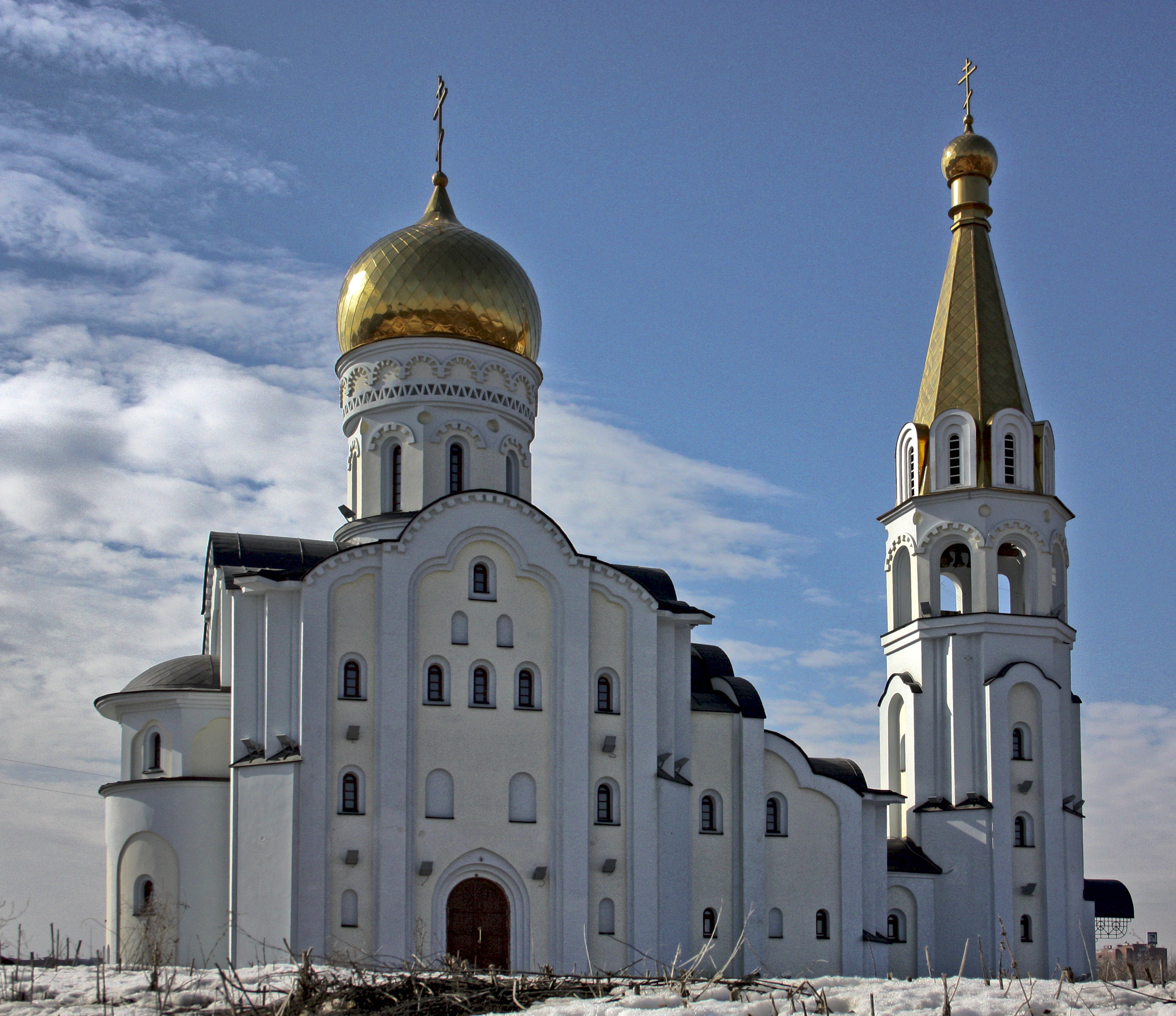 Самара, Храм в честь святой мученицы Татианы